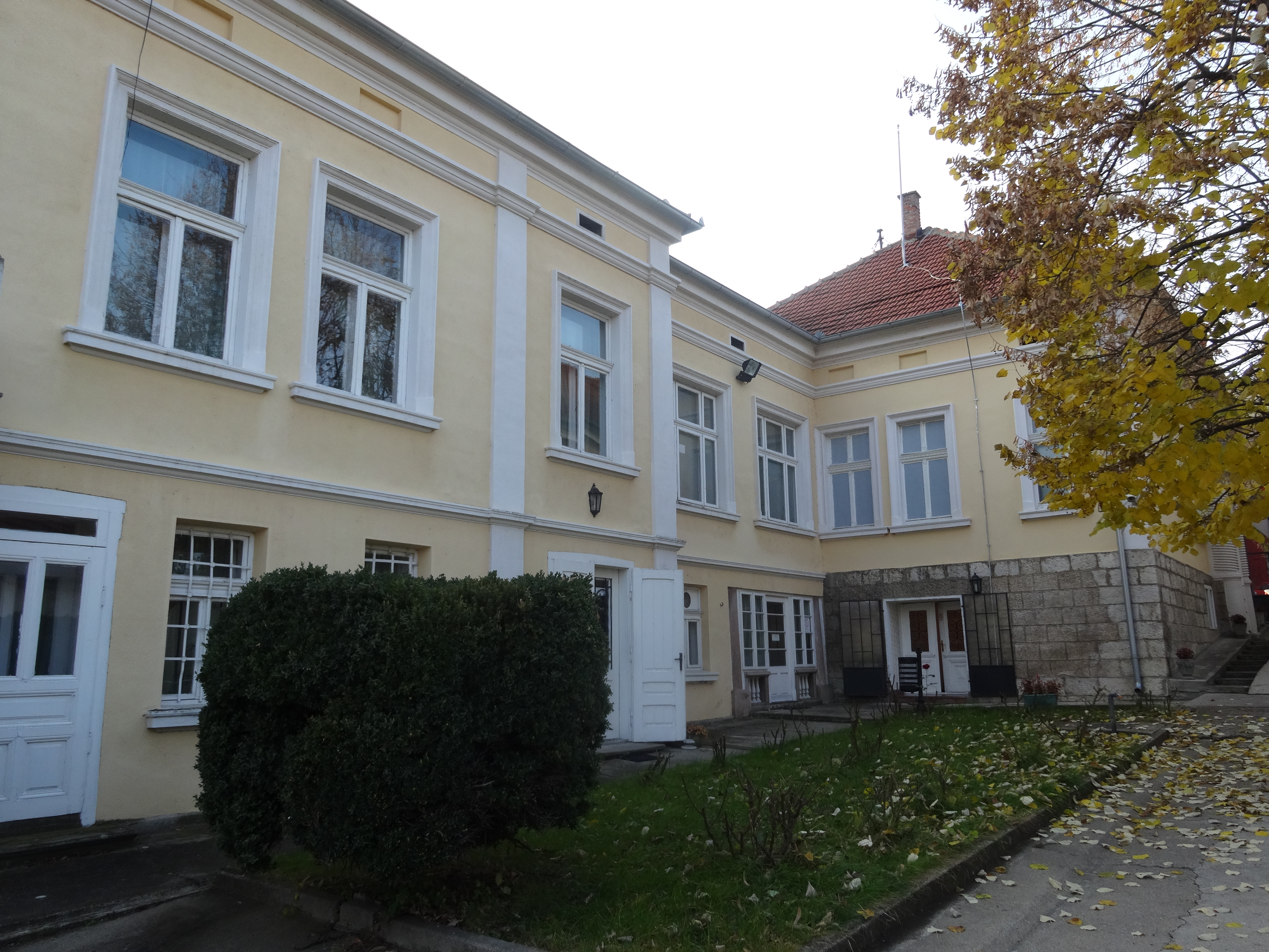 Srpski (latinica): Administrativna zgrada Zavičajnog muzeja Knjaževac.